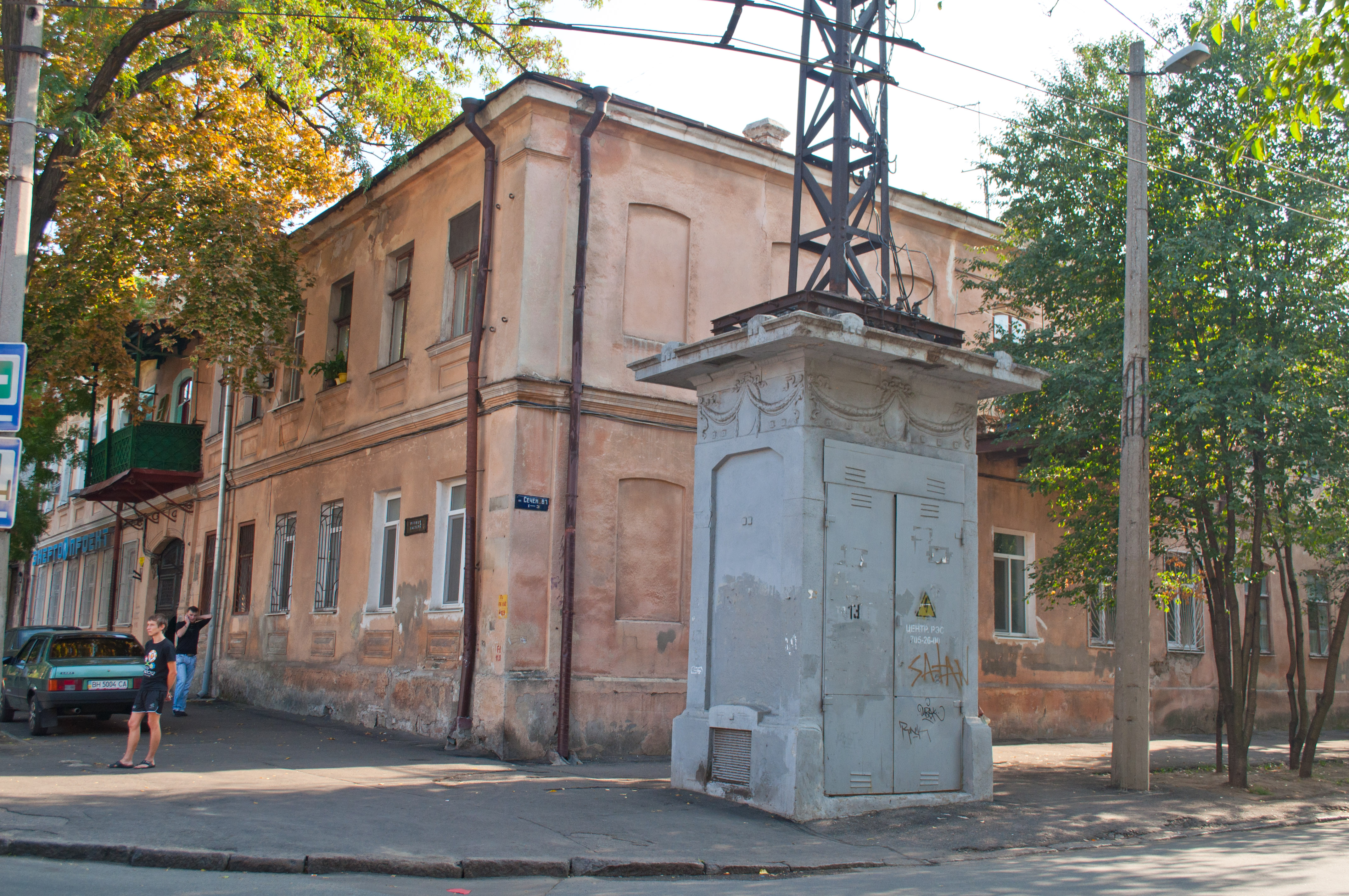 Трансформаторна підстанція електричного трамваю